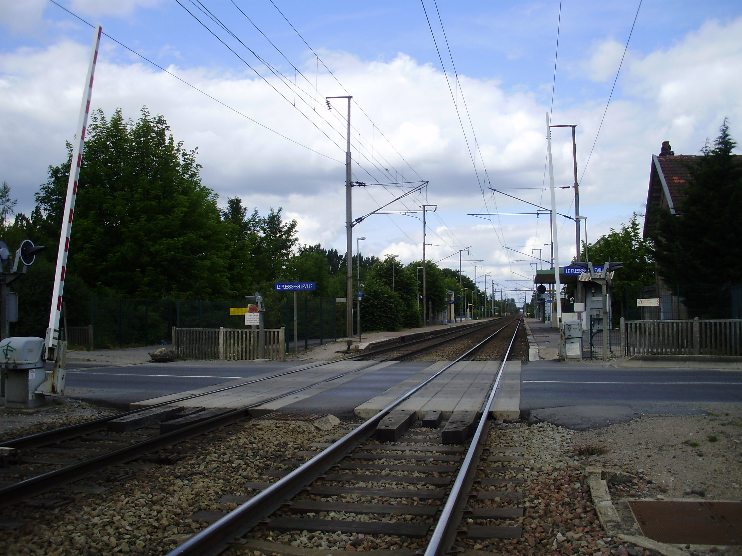 Gare du Plessis-Belleville, Oise, France : vue d'ensemble depuis le passage à niveau de la route nationale 330 au sud de la gare